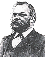 Robert Stock 1888 Quelle: Fa. R. Stock AG Berlin Lizenz: PD